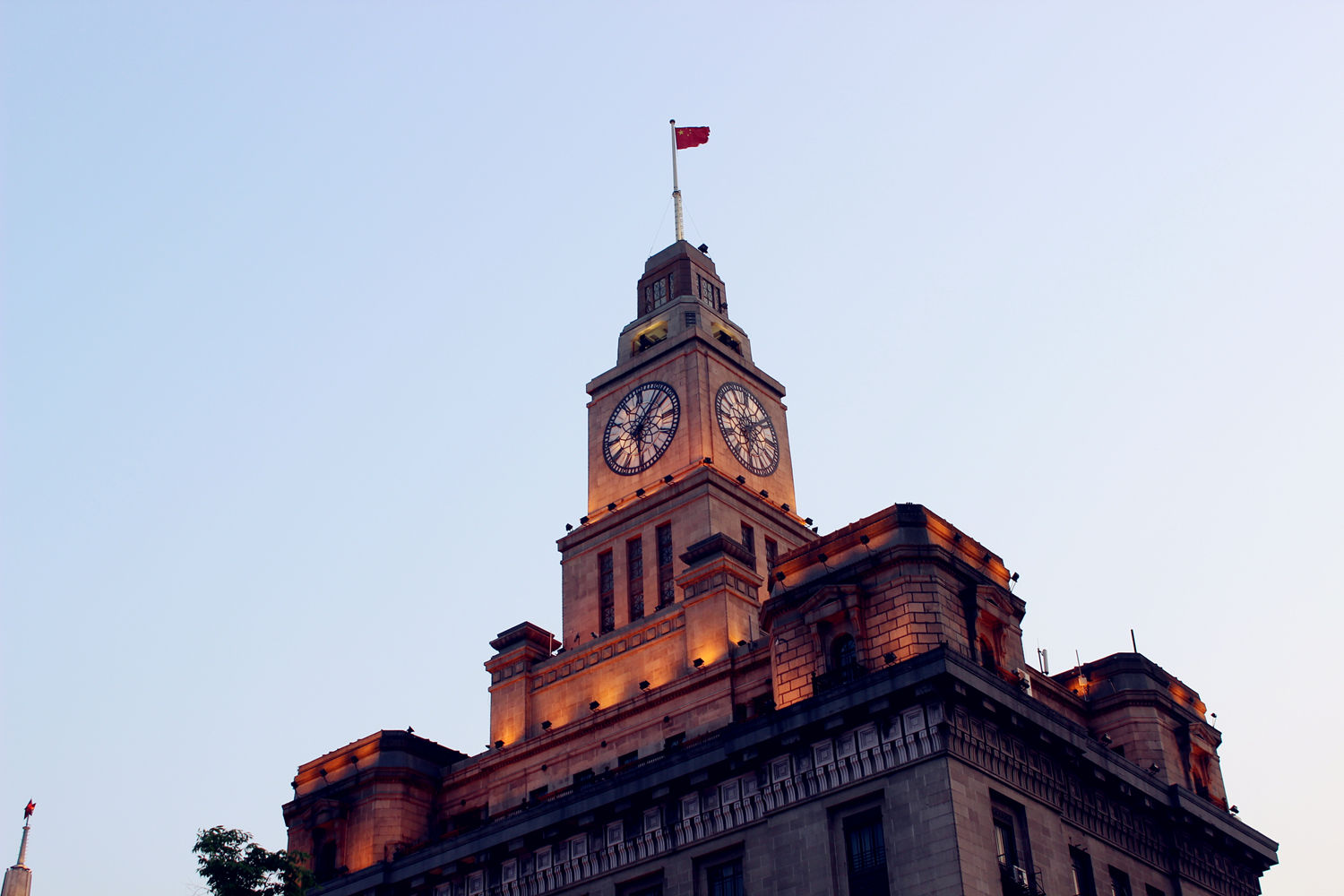 中文（中国大陆）: 江海关钟楼